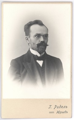 Vladimir Jakovlevitš Rubaškin